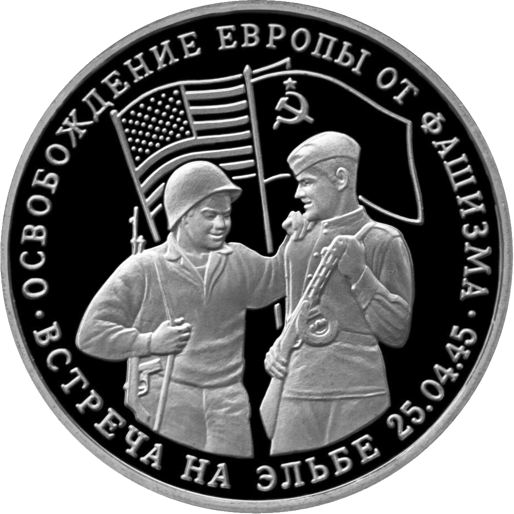 Монета Банка России — Серия: «Великая Отечественная война», 50-летие Победы в Великой Отечественной войне , Встреча на Эльбе, 3 рубля, реверс.